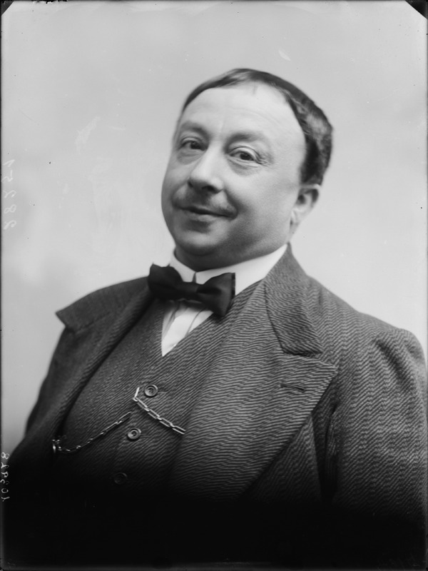 Nicola Maldacea fotografato da Mario Nunes Vais